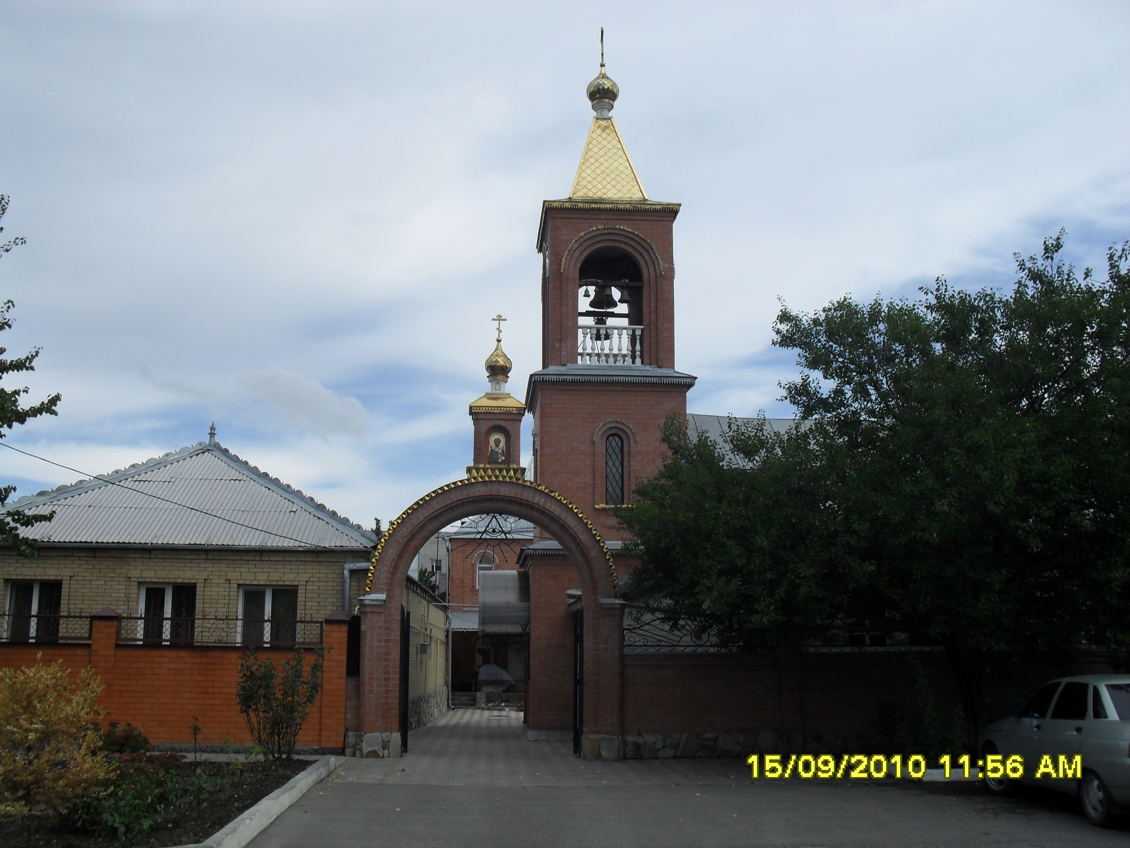 Храм Николая Чудотворца в городе Минеральные Воды